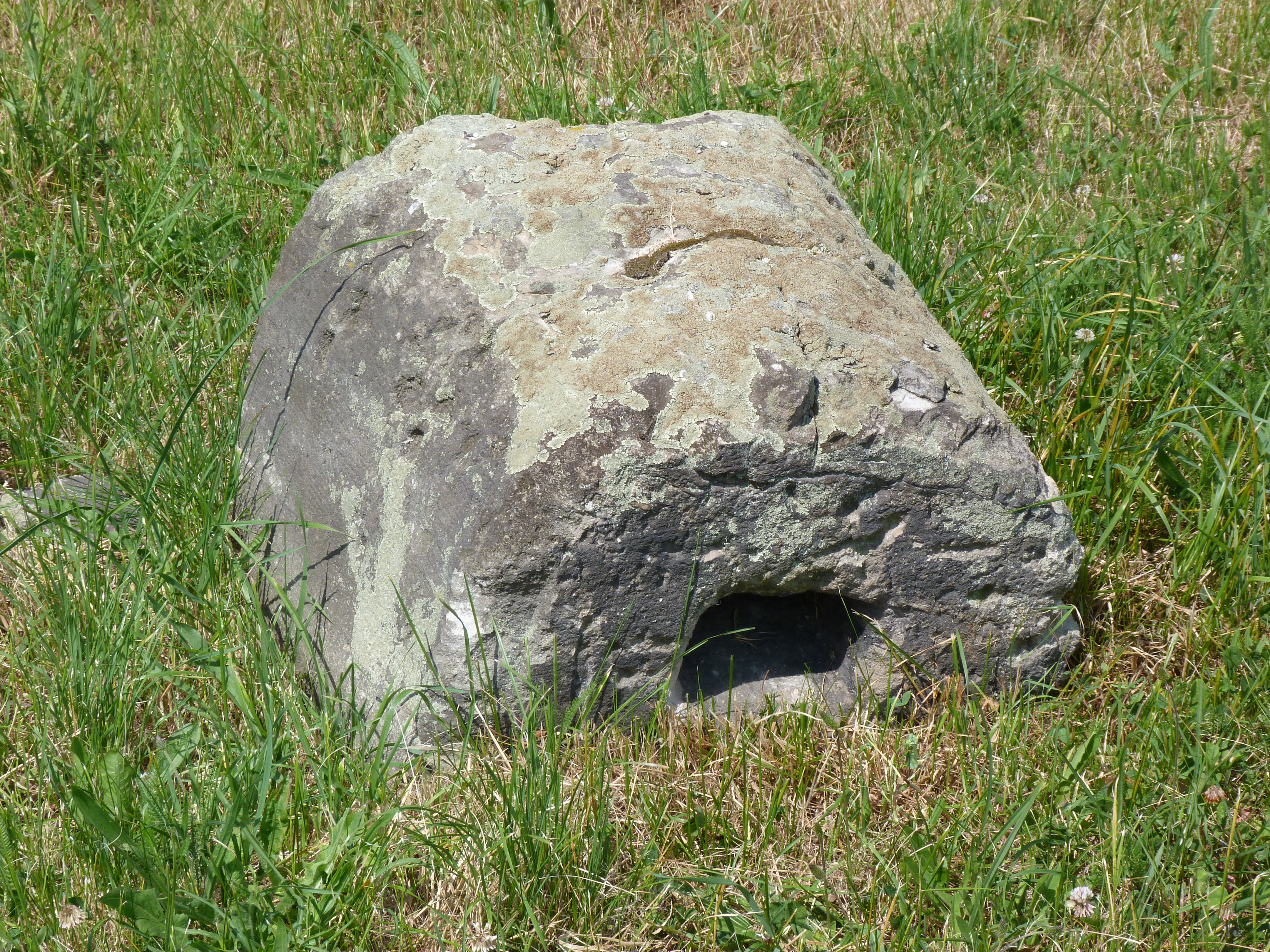 A felvétel 2014. június 18-án szerdán készült Tolcsván. Léleklyuk. Tokaj-Hegyalján a pincék tetején elhelyezett szellőző. A könnyen faragható riolitufából készítették.